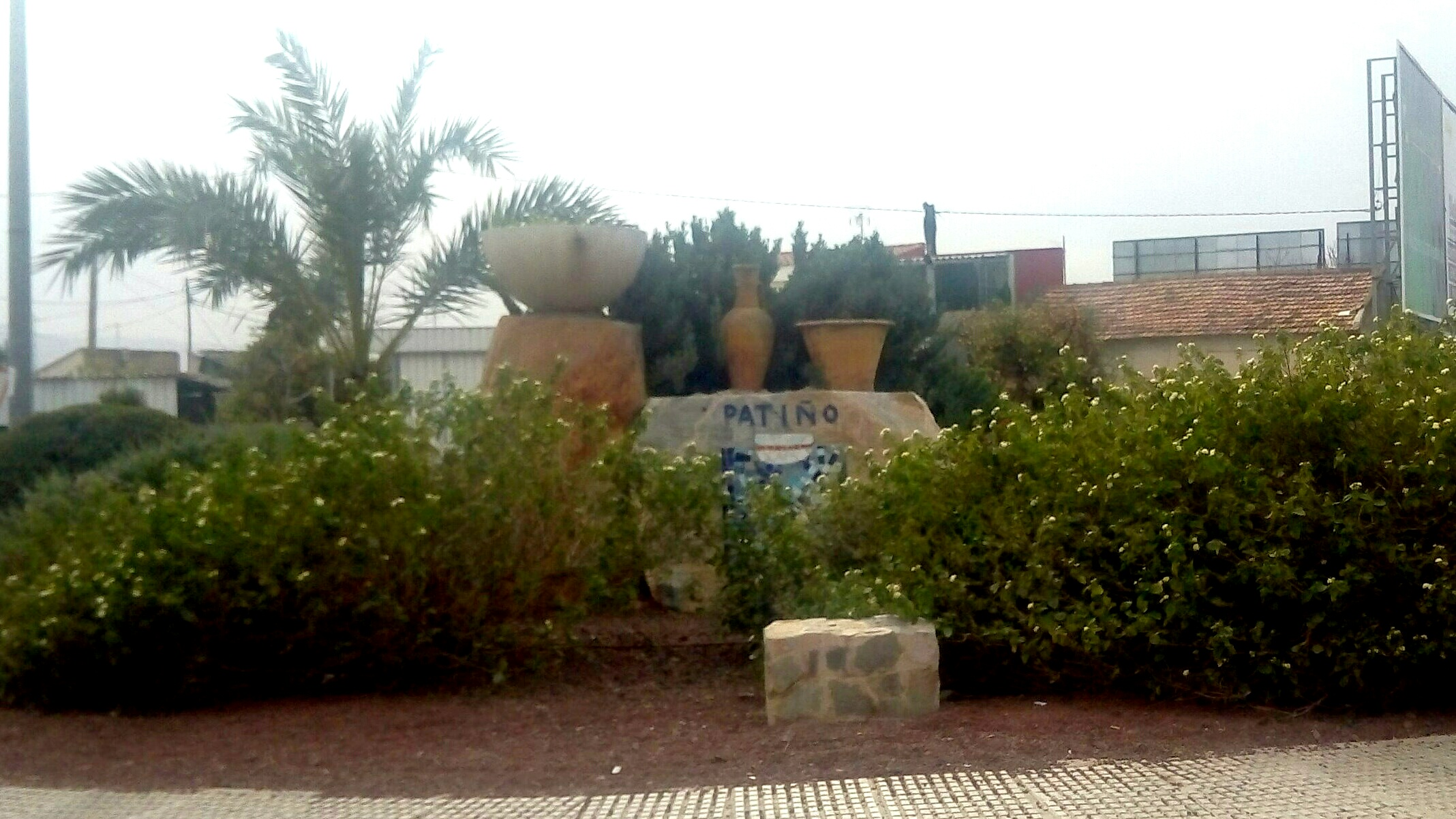 Esta imagen, tomada el día 24 de febrero de 2017, muestra el monumento que hay a la entrada de Patiño.